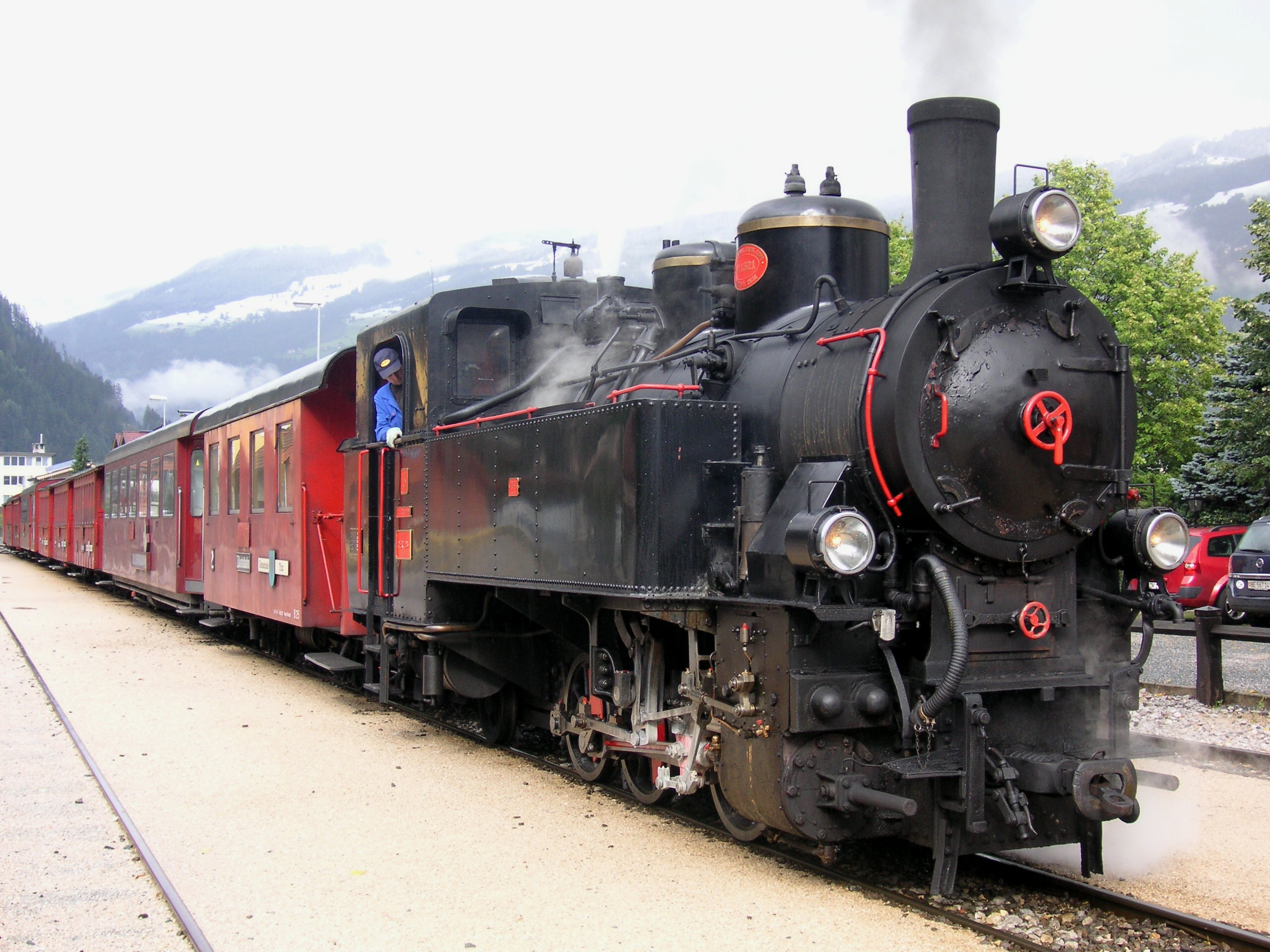 Die Zillertalbahn in Zell am Ziller, Zug mit Lok 5 (Reihe Uh)